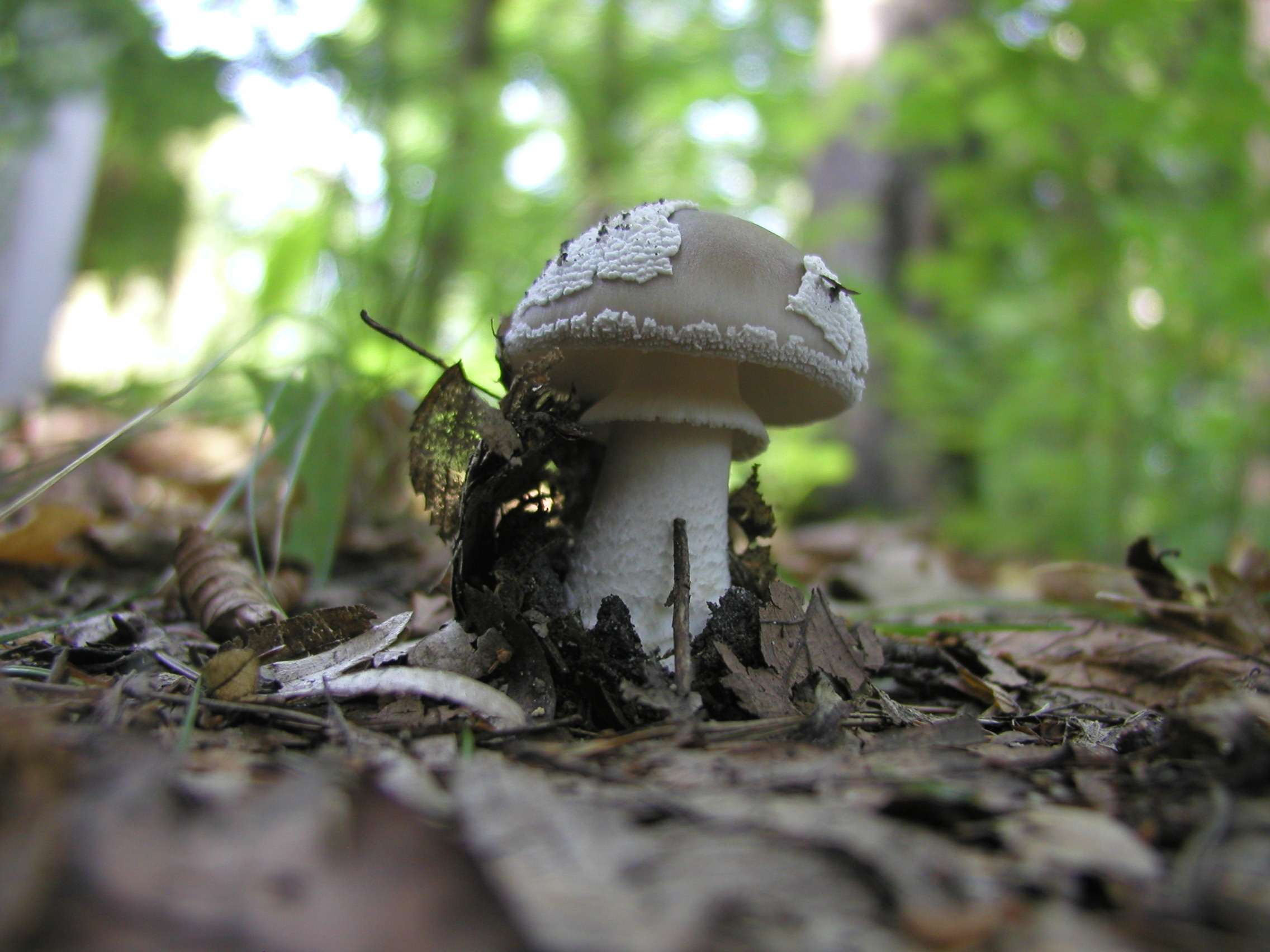 Muchomor twardawy Amanita spissa (syn. a. excelsa)